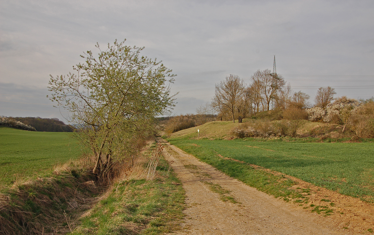 Siegental bei Markgröningen (von Süden); links Klepperhölzle, rechts Muckenschupf